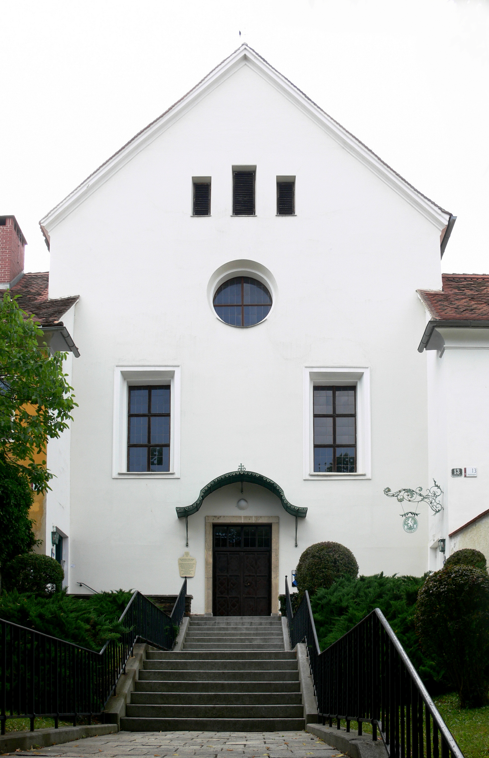 Graz, Antoniuskirche (heute Teil des Volkskundemuseums des Landesmuseums Joanneum)